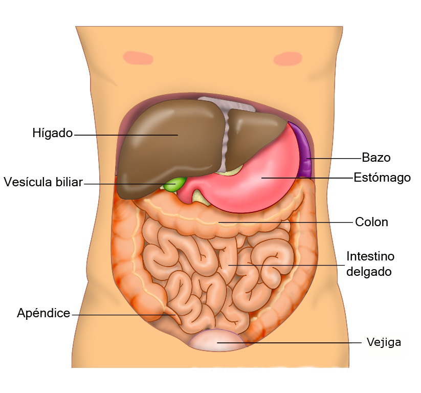 Anatomía del abdomen humano, de Ties van Brussel/tiesworks.nl